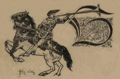 Lettrine G avec goliard à cheval.